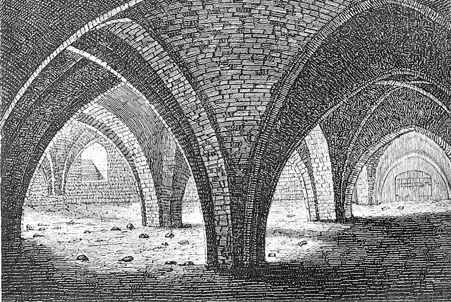 Aalborg Kloster / Aalborg Hospital hvælvinger i kælderen. Aalborg Kloster blev oprettet som et helligåndshus den 20. august 1431.